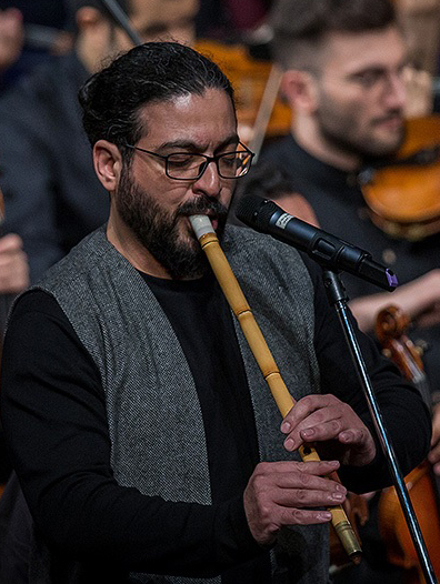 پاشا هنجنی - کنسرت ارکستر سمفونیک تهران چهارشنبه ۲۳ آبان ۱۳۹۷ به رهبری شهرداد روحانی تالار وحدت